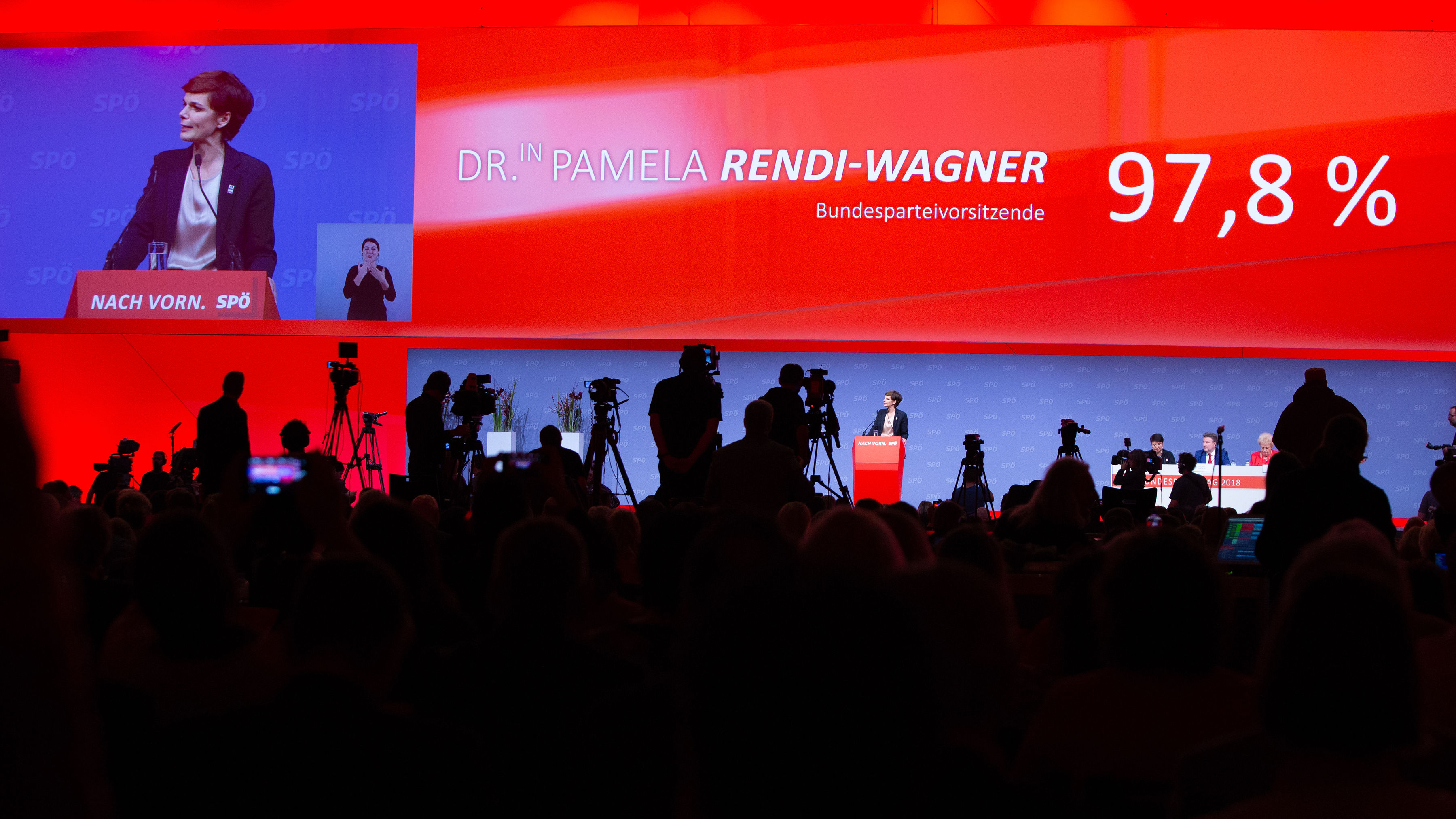 1178-by-Alissar-Najjar